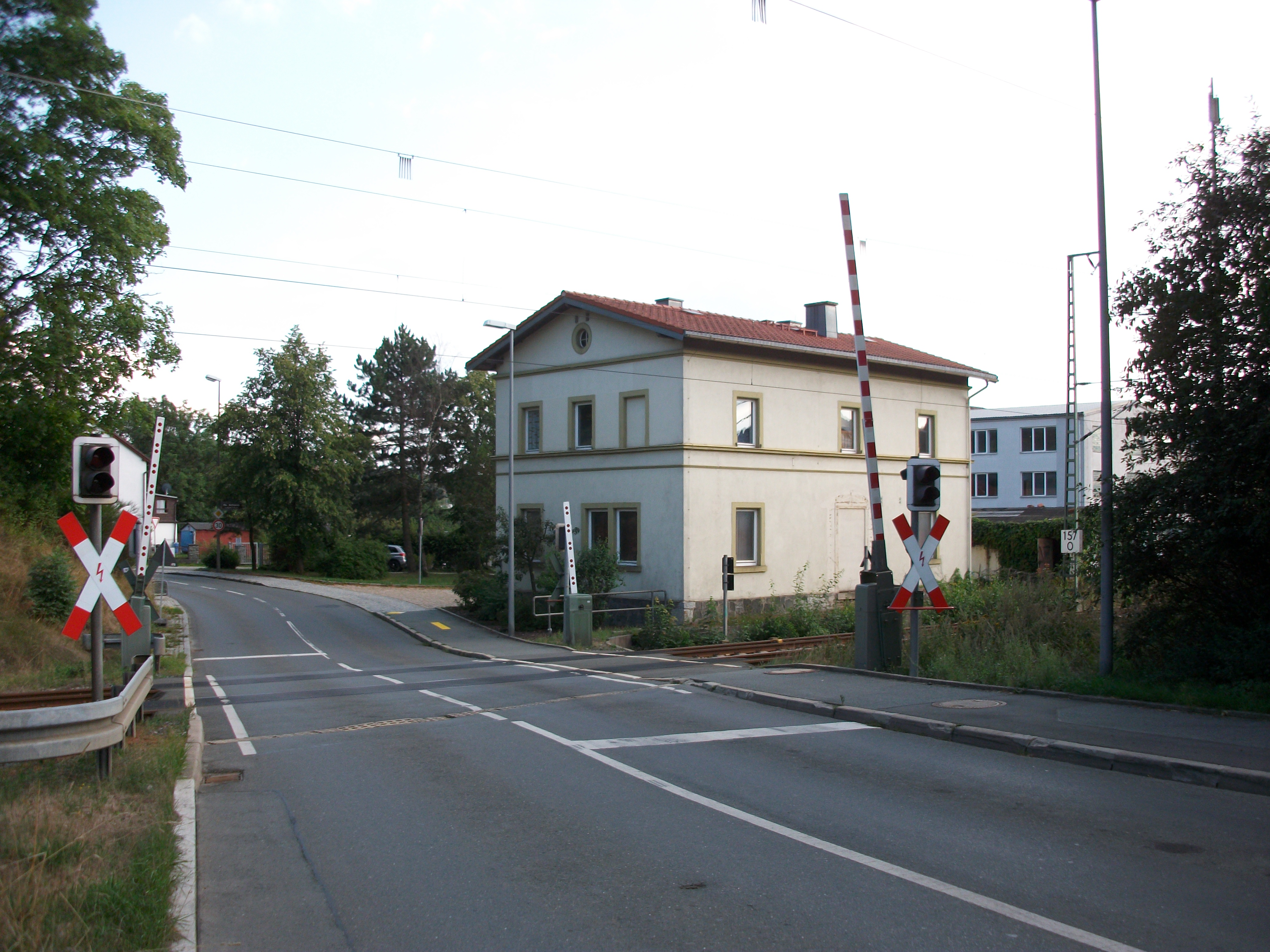 Haltepunkt Feilitzsch (alt), Empfangsgebäude und Bahnübergang (2019)